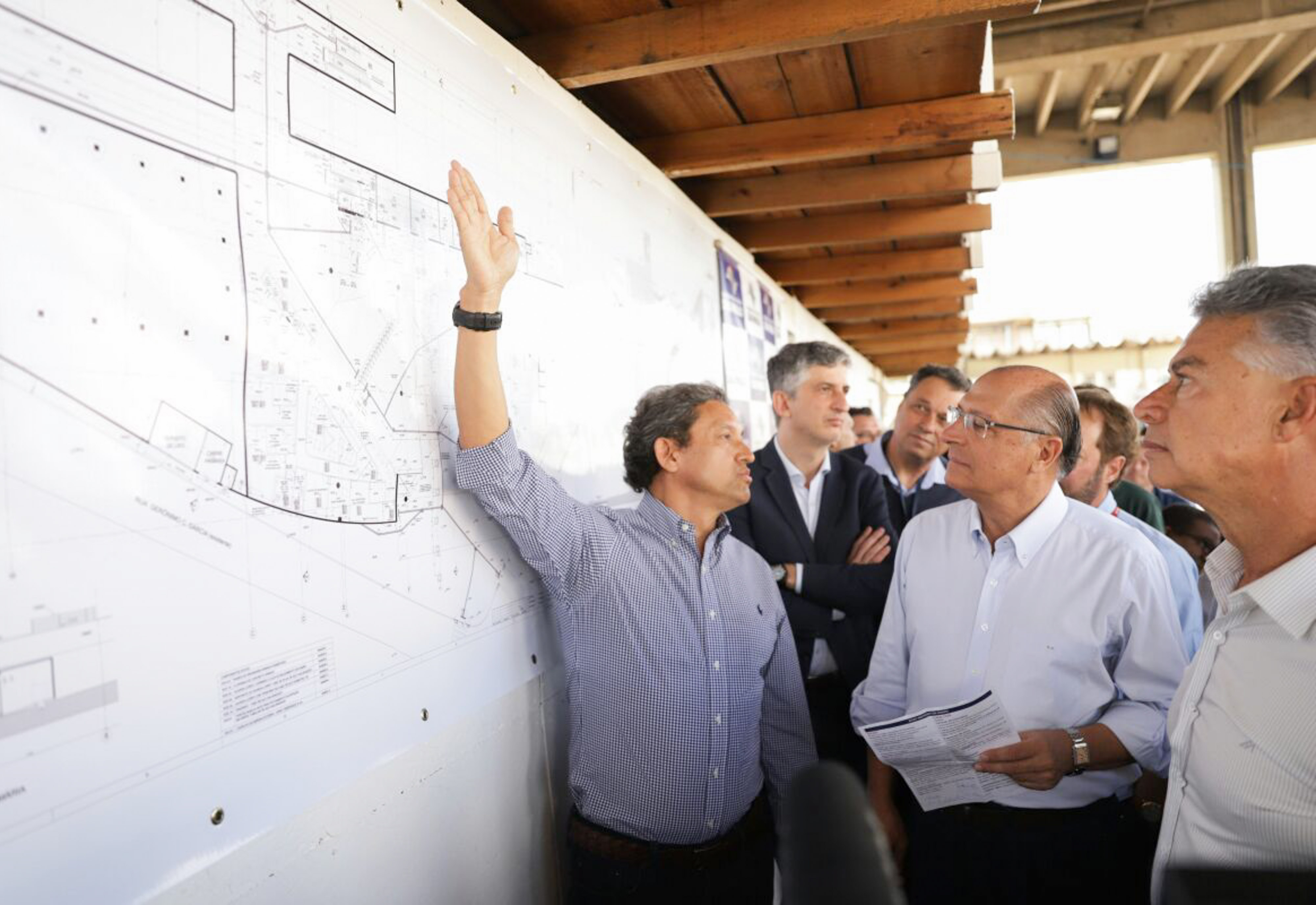 O Governador do Estado de São Paulo, Gerlado Alckmin, participa do Início da segunda etapa das Obras de reforma da Estação de Francisco Morato da CPTM Invest.: R$ 114 milhões.Local: Francisco Morato/SP Data: 17/02/2018 Foto: Governo do Estado de São Paulo